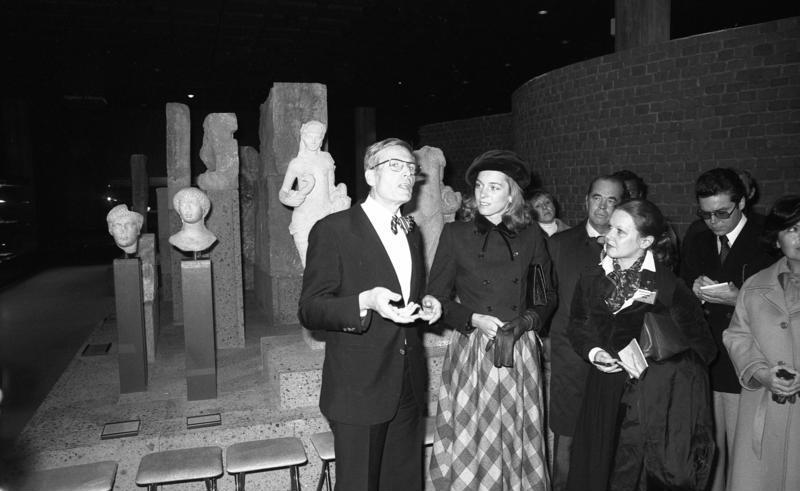 Staatsbesuch König Husskin II. und Königin Nur Al-Hussein in der Bundesrepublik Deutschland. (7.11.78) Köln: Königin Nur Al-Hussein besichtigt das Römisch-Germanische Museum.